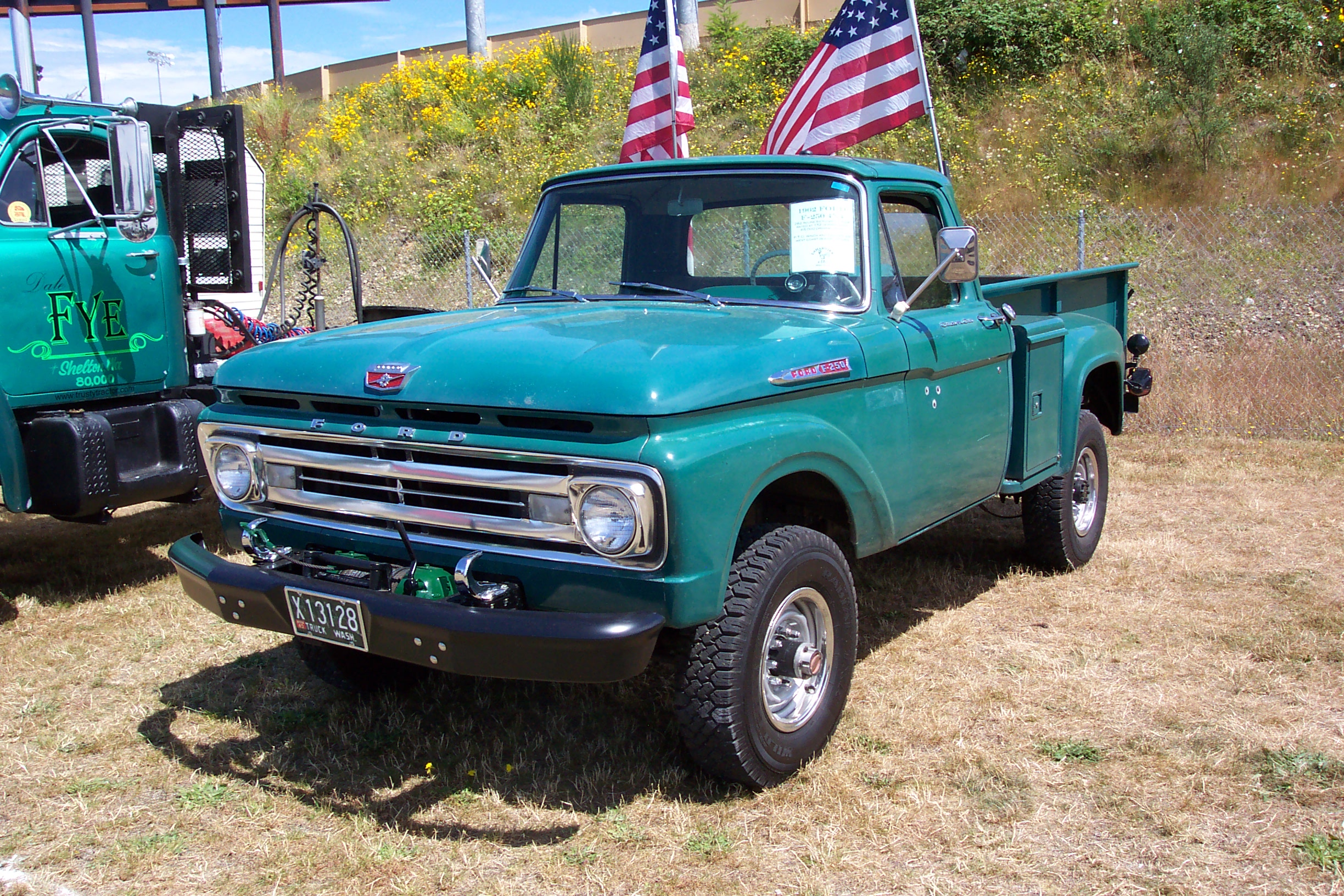 1962 Ford 4X4